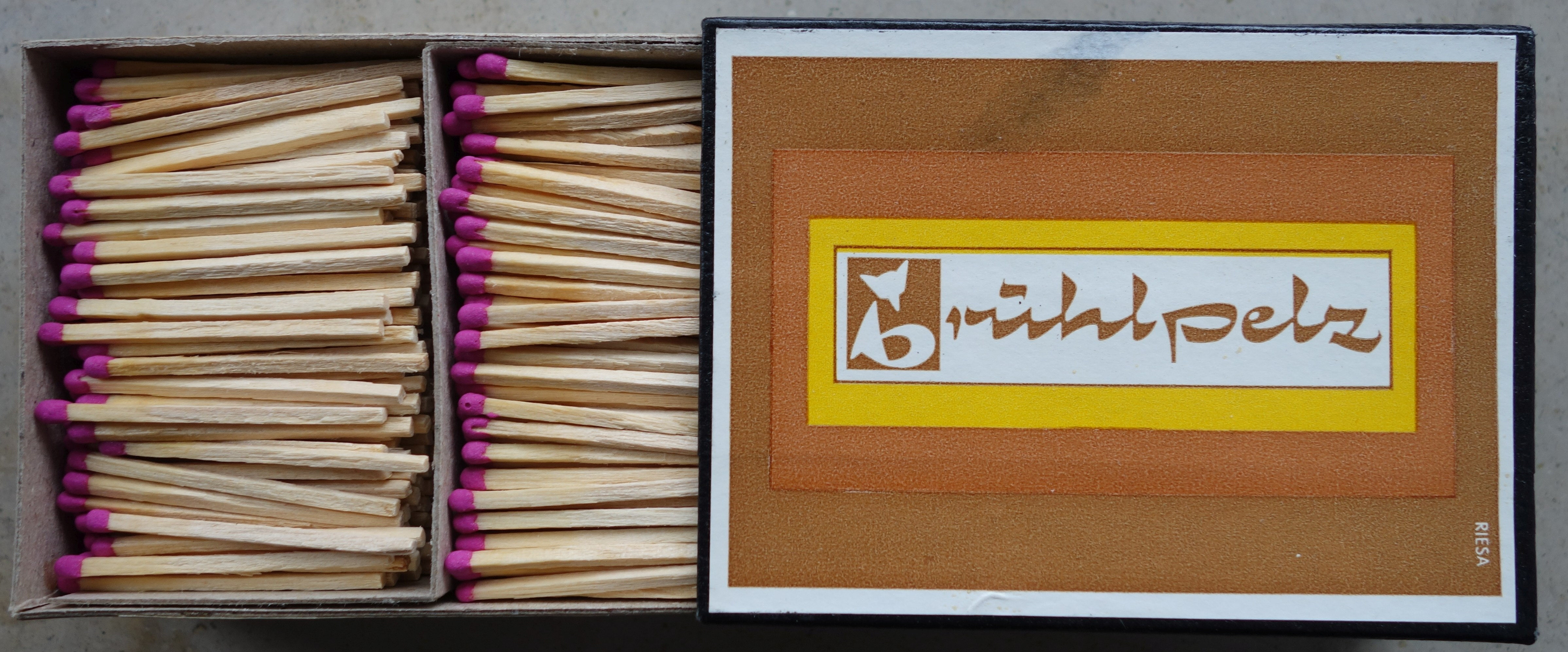 Streichhölzer, Werbegeschenk Brühlpelz. Karton ca. 10 x 7,5 x 3,5 cm, beidseitig Reibeflächen. Unter der neuen Bezeichnung »Brühlpelz« VEB Leipziger Rauchwarenindustrie waren im Jahr 1966 folgende DDR-Betriebe zusammengefasst: VEB Stadtpelz, VEB Edelpelz, VEB Sachenpelz, VEB Pelzkonfektion Schkeuditz, und Adolf Arnhold KG Naunhof. Dieser Verbund war wiederum vereint im Kombinat Kunstleder und Pelzverarbeitung mit der VEB Sachsenpelz Naunhof, der VEB Edelpelz Schkeuditz, der VEB Pelzhandel am Brühl und der VEB Brühlpelz Leipzig sowie weitere Betriebe der Pelzwirtschaft.